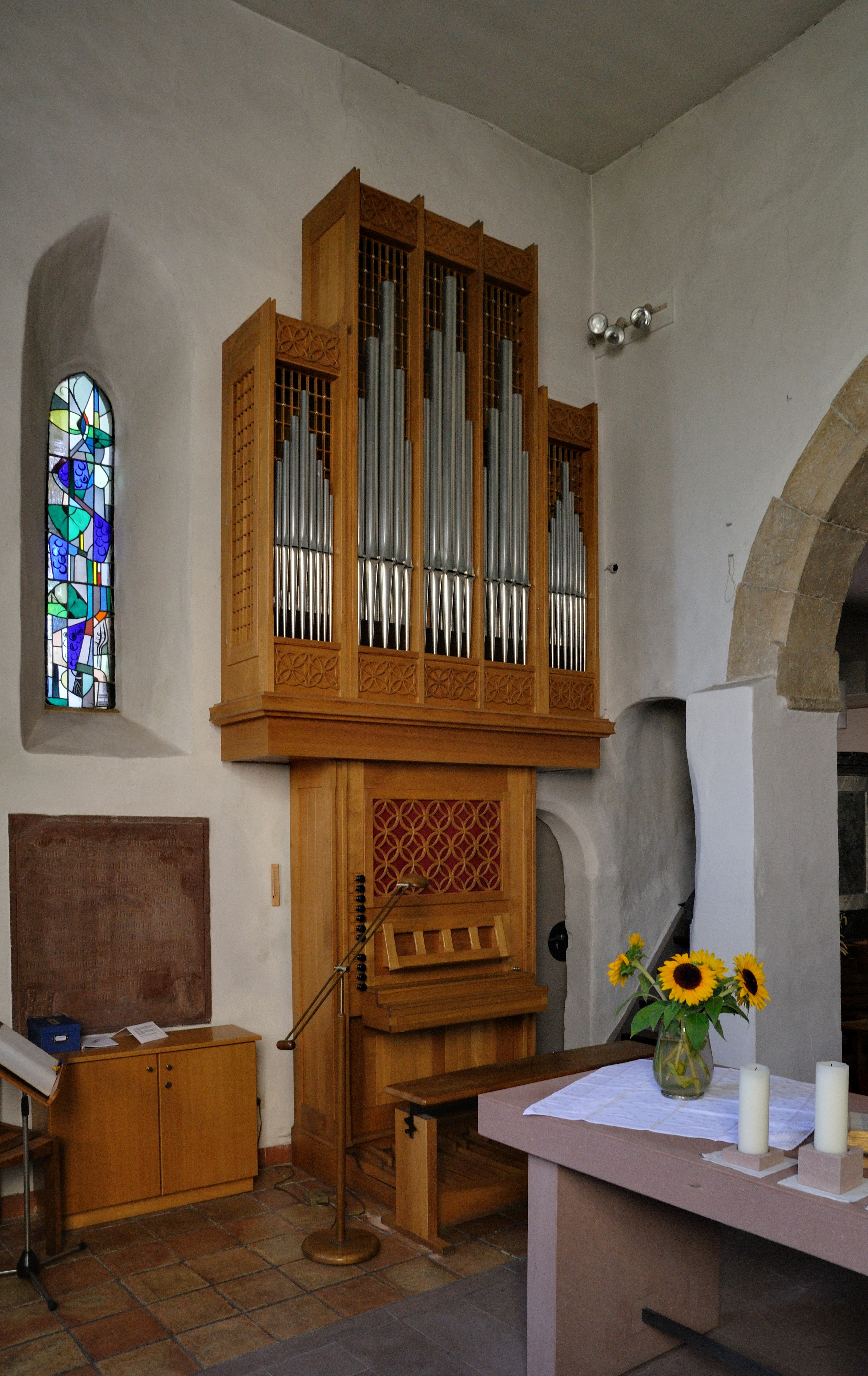 Tüllingen: Orgel in der Ottilienkirche